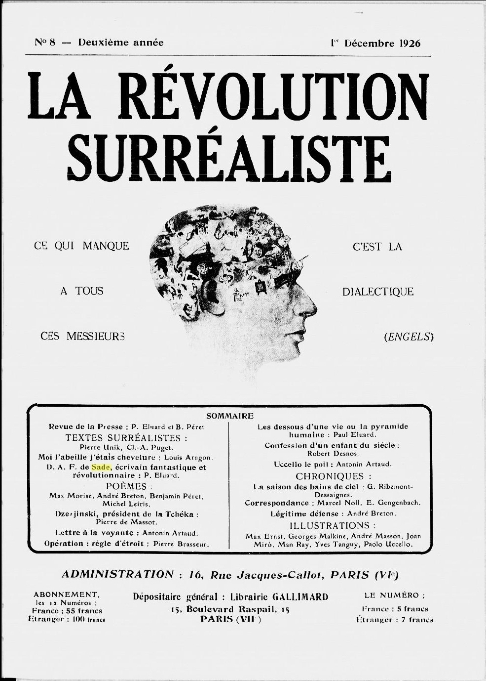 Revue "La Révolution surréaliste" no 8 du 01/12/1926.